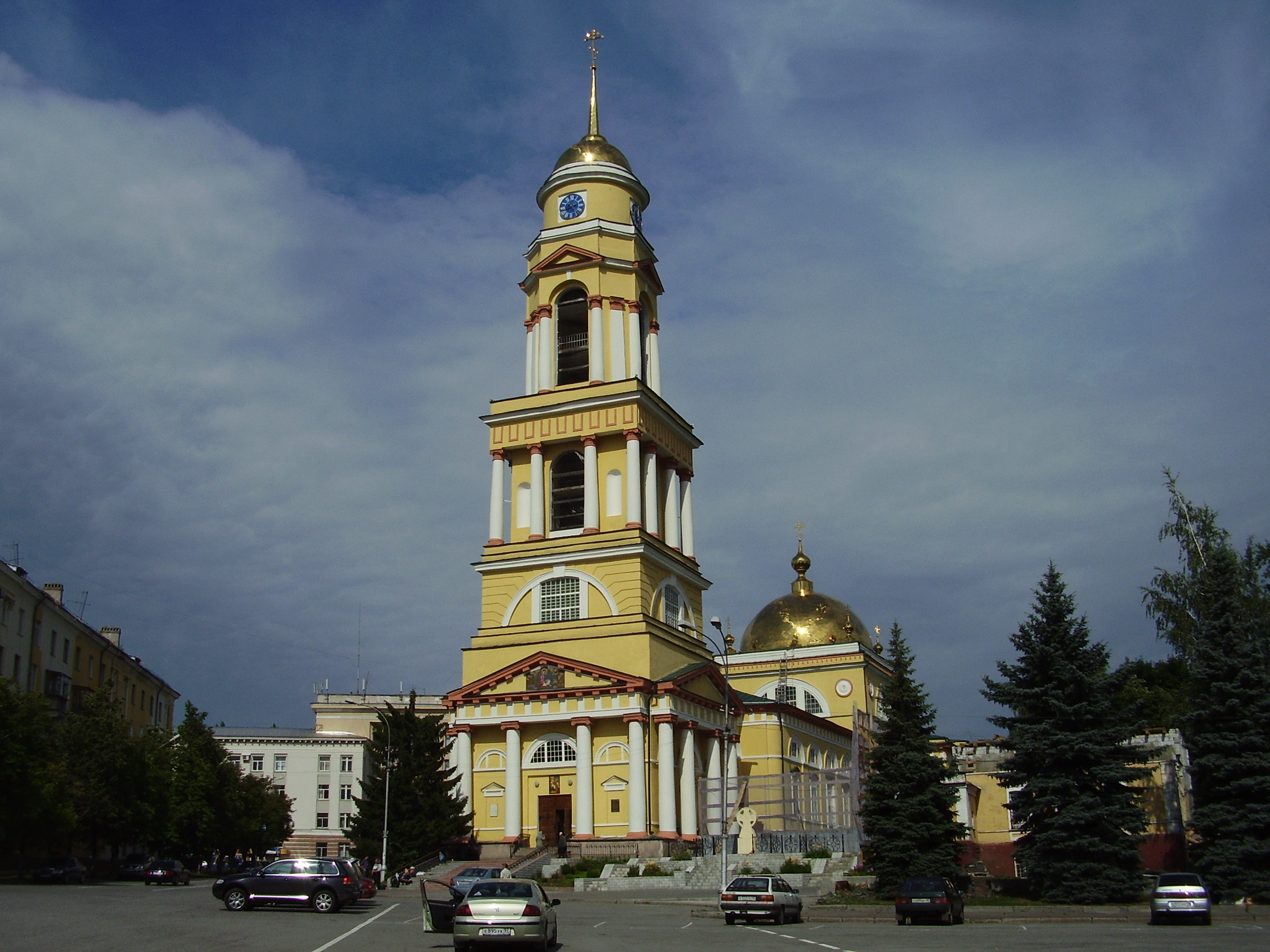 Липецк, Христорождественский Кафедральный собор